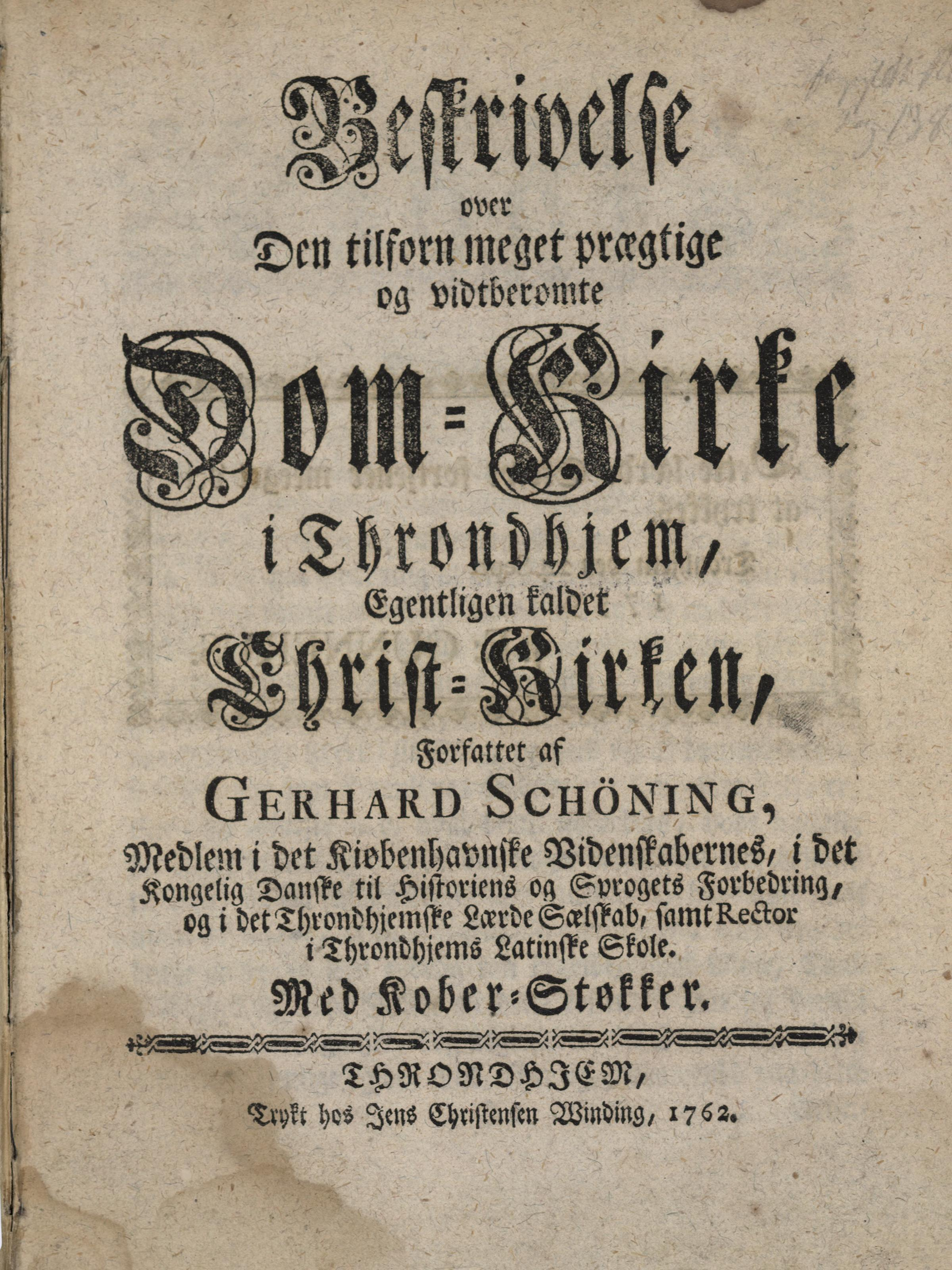 Illustrasjon hentet fra boken "Beskrivelse over den tilforn meget prægtige og vidtberømte Dom-Kirke i Throndhjem, egentligen kaldet Christ-Kirken" av Schøning, Gerhard og utgitt av Trykt hos Jens Christensen Winding (Trondheim, 1762)